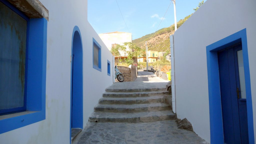 Pujant a Leni pel camŕ empedrat i esgraonat des de Rinella... tot és pujada!